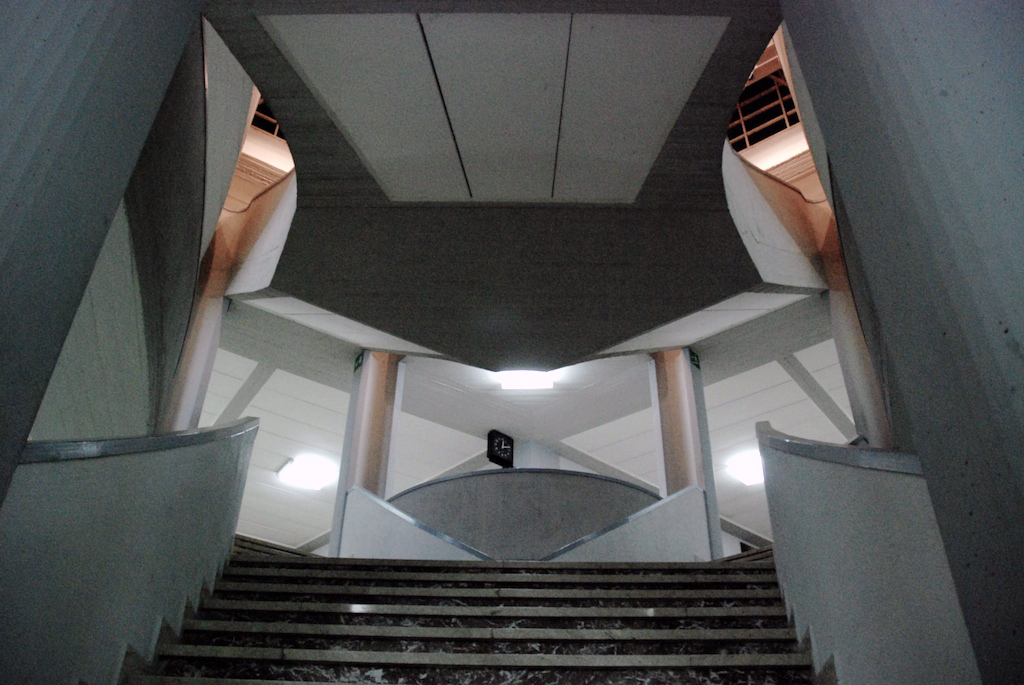 Scalinata interna dell'Accademia di Belle Arti dell'Aquila